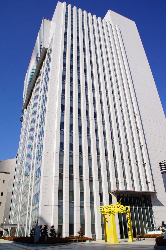 大阪市交通局の本局庁舎です。